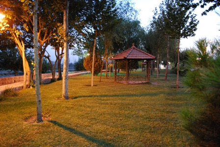 گرفته شده شهرداری محترم /بارگزاری ع.الف